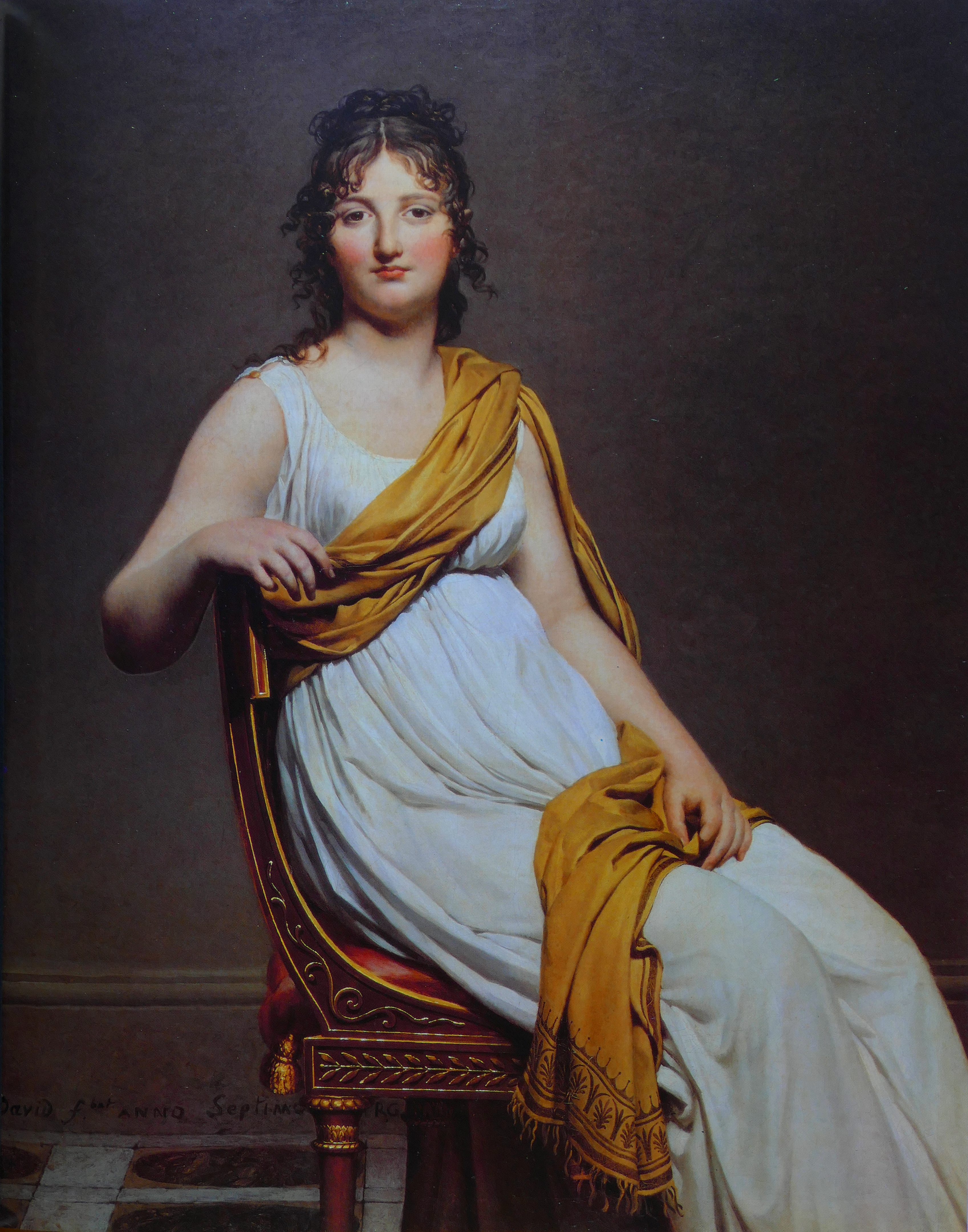 Portrait d'Henriette de Verninac, 1799, par Jacques-Louis David, huile sur toile 145 x 112 cm, musée du Louvre